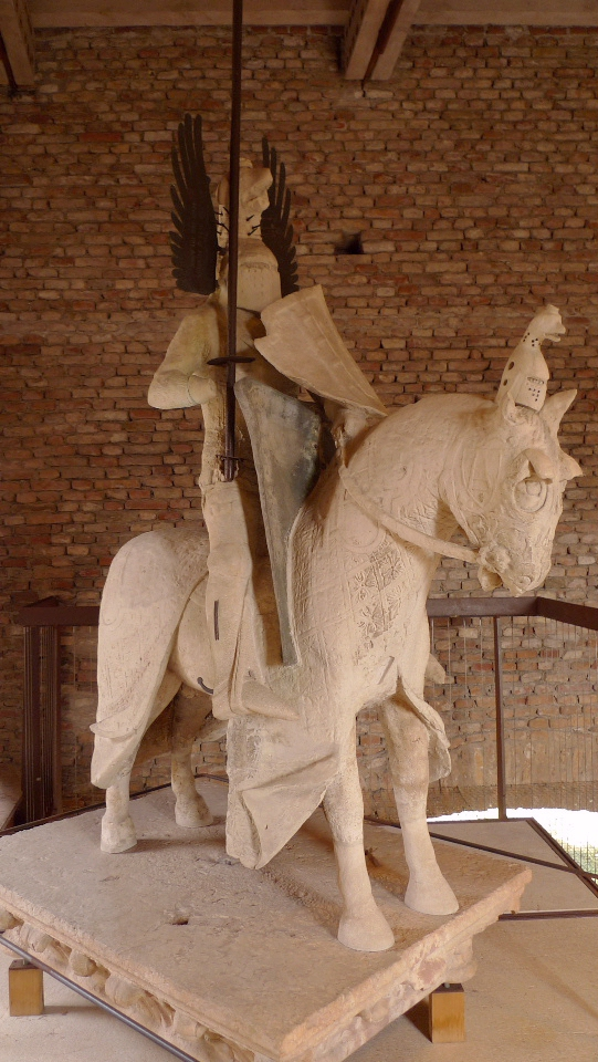 Reiterstandbild von Mastino II. della Scala (etwa 1350) im Castelvecchio (Verona) - ursprünglicher Standort: Scaliger-Gräber (neben der Kirche Santa Maria Antica - heute befindet sich dort eine Kopie des Originals)